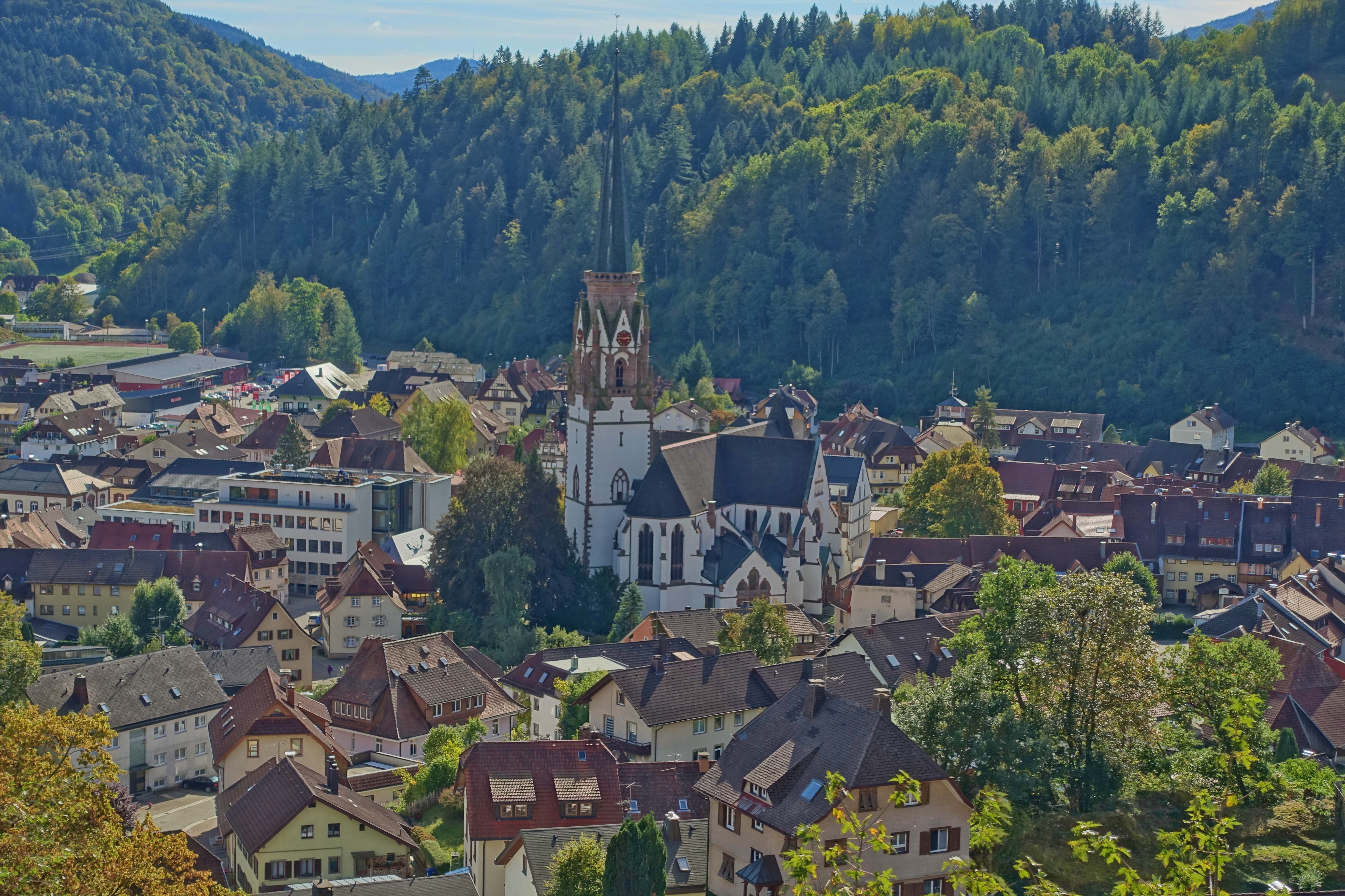 Schönau im Schwarzwald mit Blick auf Kirche Maria Himmelfahrt